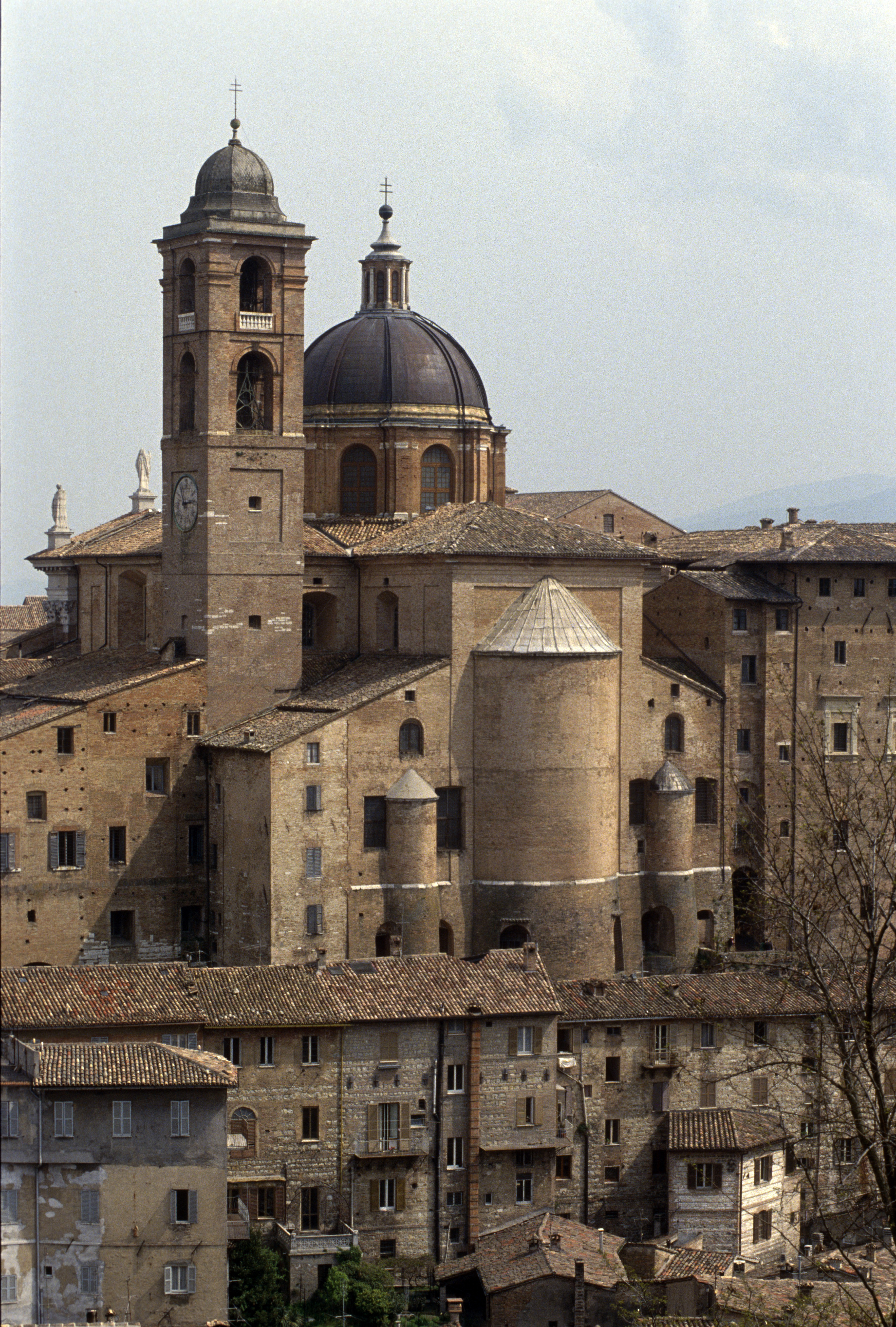 Urbino, Marche, Italia